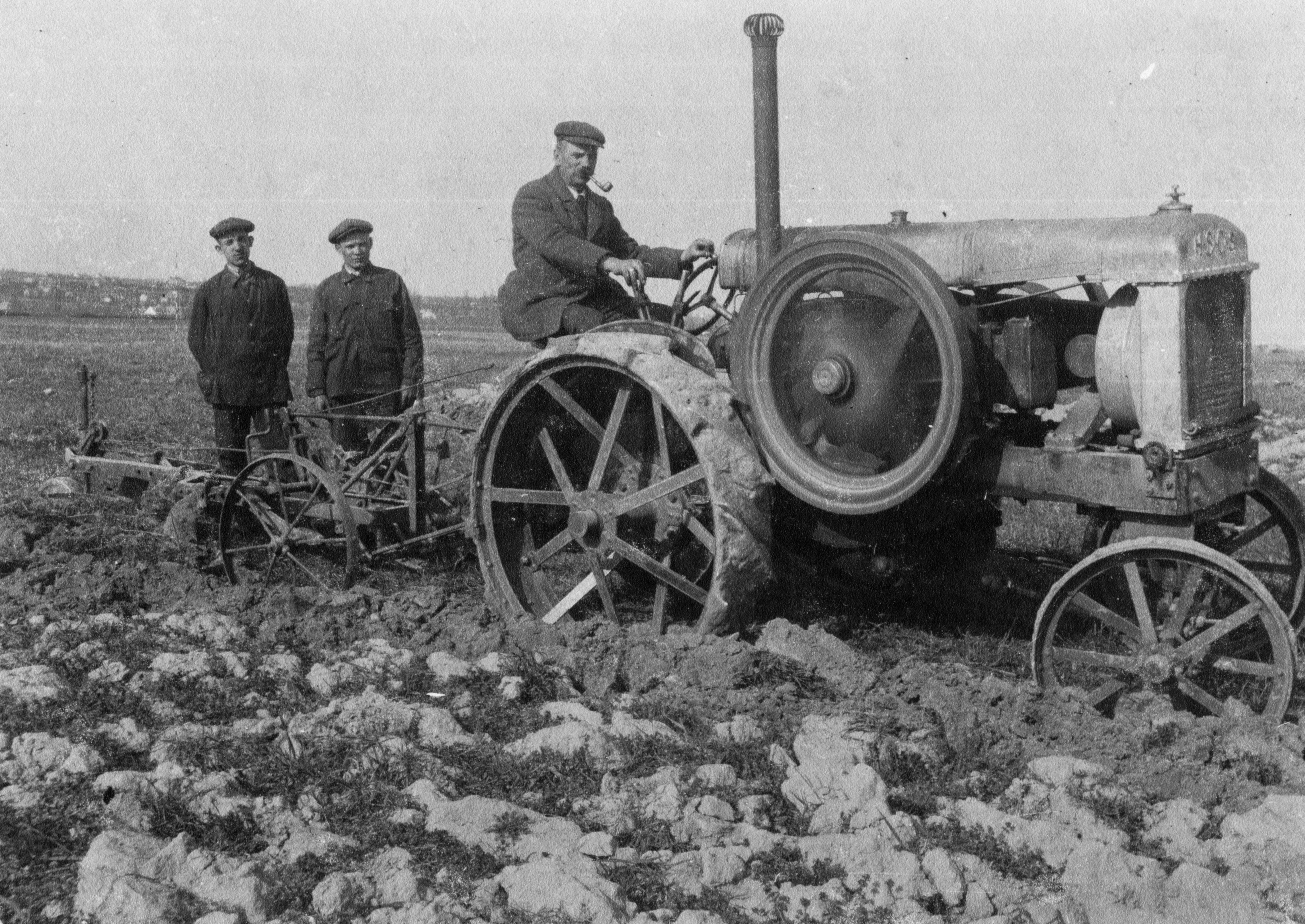 Hofherr-Schrantz-Clayton-Shuttleworth (HSCS) traktor. Tags: tractor, agriculture, H.S.C.S-brand, Hungarian brand Title: Hofherr-Schrantz-Clayton-Shuttleworth (HSCS) traktor.